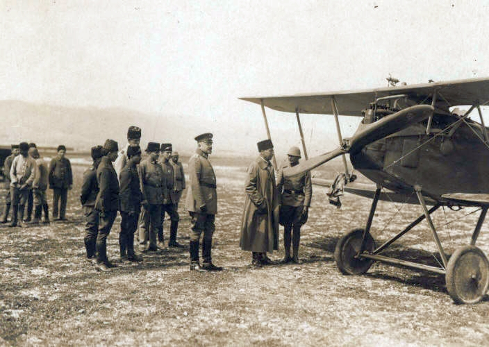 Smyrna im Jahr 1917. Hauptmann Buddecke mit Helm begrüßt General Otto Liman von Sanders, dt. Oberbefehlshaber d. türk. Armee. Zu sehen ist Buddeckes Flugzeug Typ Halberstadt (Flugzeug) (D.III?).